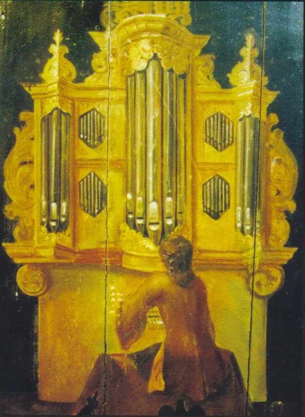 Bildnis an der Orgelempore von Golzwarden (1701)